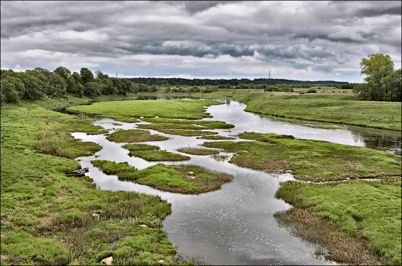 Рака Дзісна